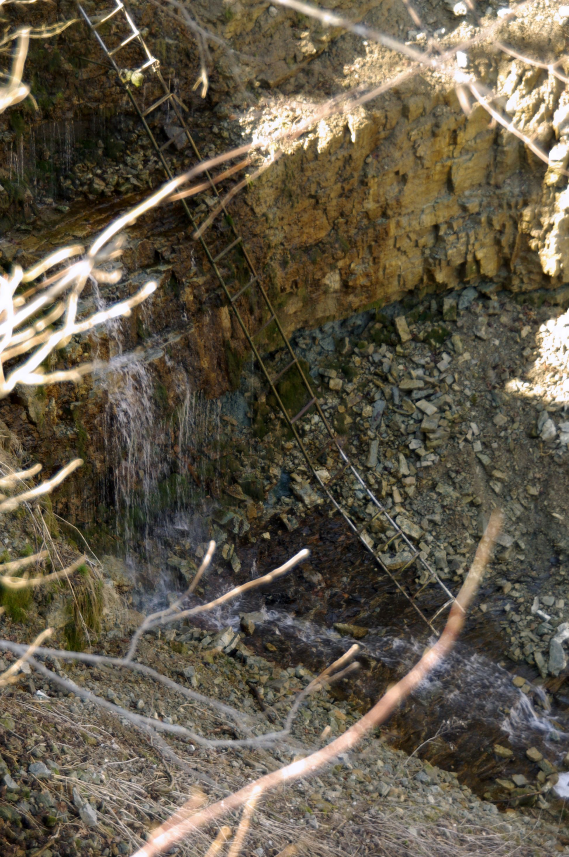 asub Saka külas Kohtla vallas Ida-Viru maakonnas